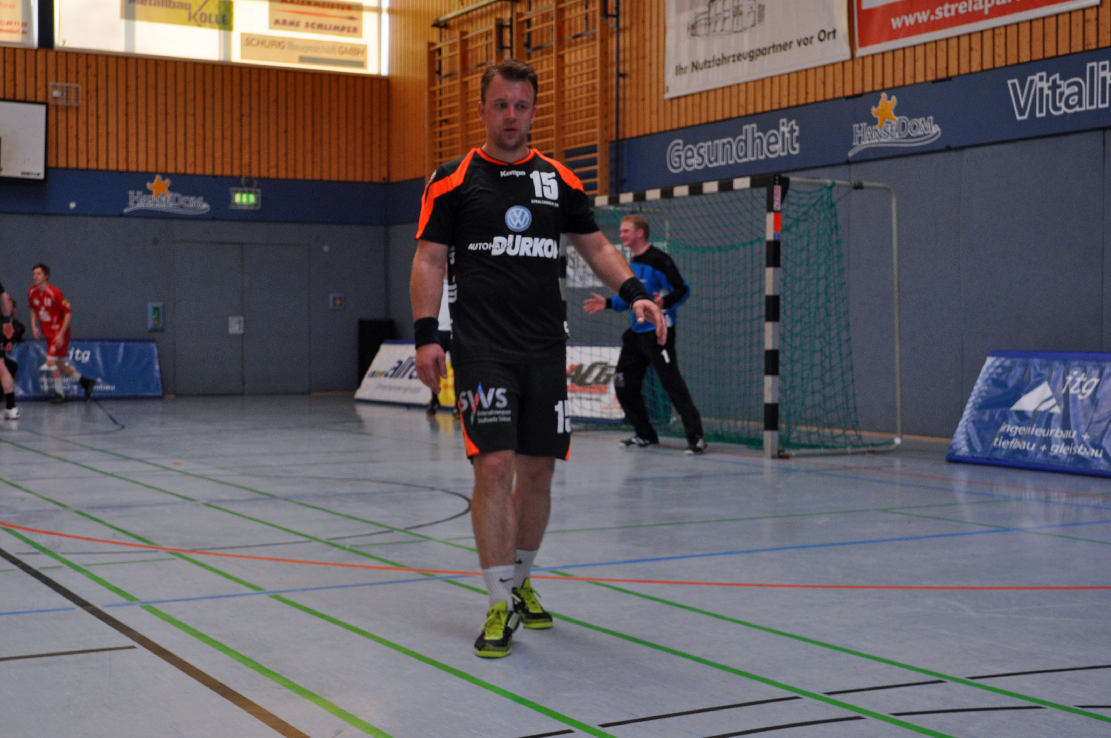 Beim Spiel der ersten Männer-Mannschaft des Stralsunder HV nach dem Punktspiel am 26.4.2014 gegen den Lausitzer HC in der Vogelsanghalle Stralsund. Durch den 37:28-Sieg wurde das Team Meister der Oberliga Ostsee-Spree und steht als Aufsteiger in die 3. Liga (DHB) fest. Im Bild Frank Wahl.